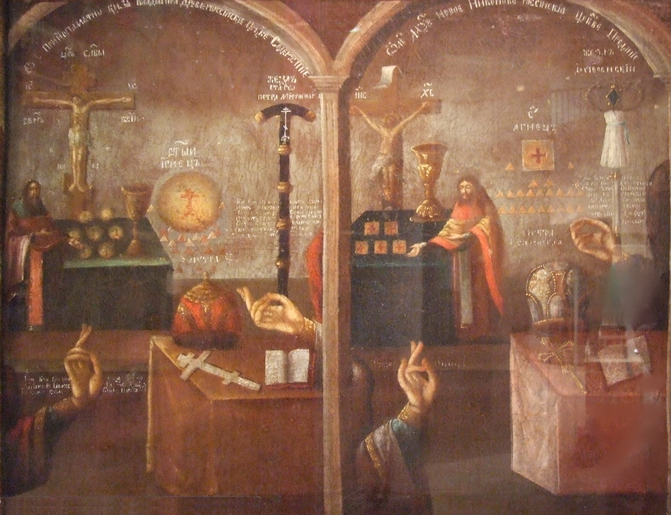 СПОР О ВЕРЕ Неизвестный художник XVIII век Холст; масло 68 х 83,2 Происхождение не установлено ГМИР инв. А-1641-IV